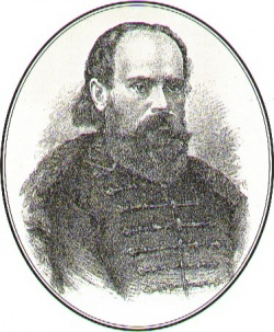 Jozef Božetech Klemens (1817 - 1883), Malíř, sochař a vynálezce .